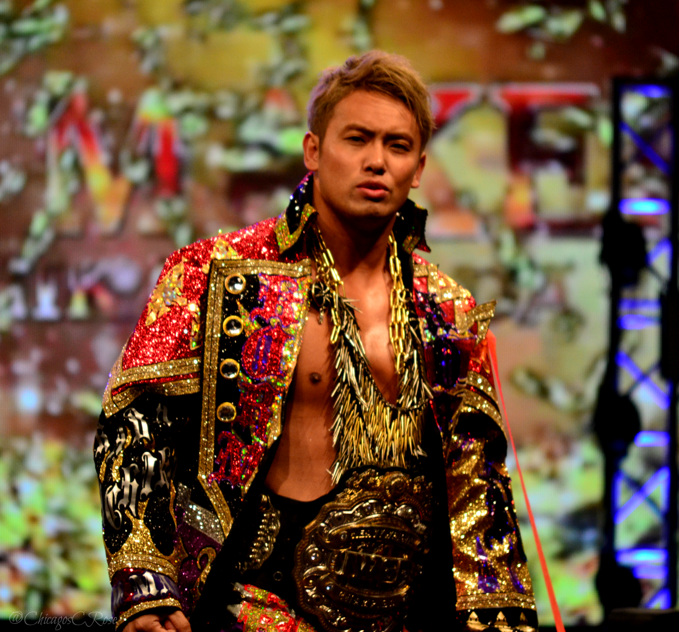 Kazuchika Okada entrant sur le ring avec une veste rouge et noir et la ceinture de champion poids-lourds IWGP.